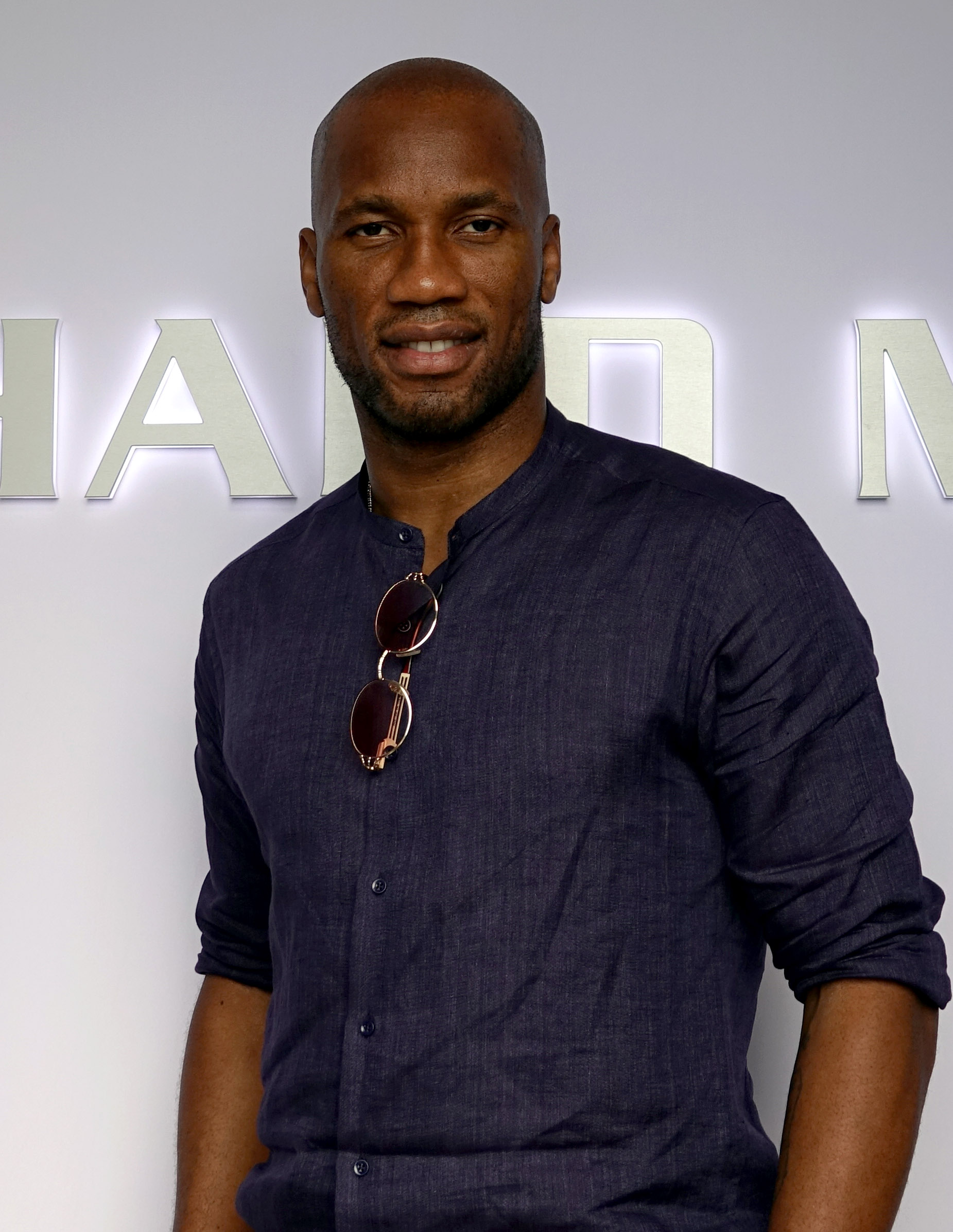 Didier Drogba au Chantilly Arts & Elegance Richard Mille 2019